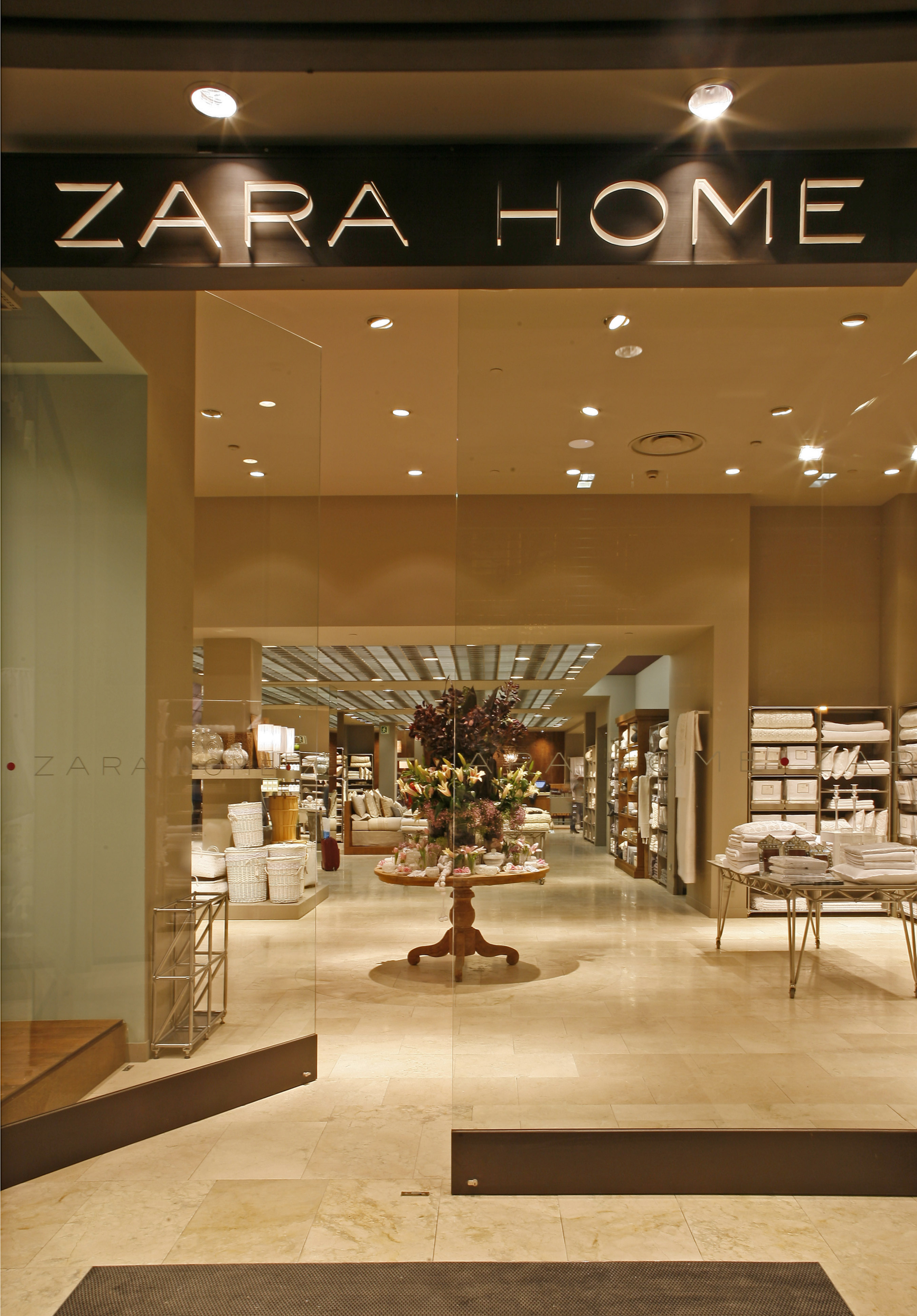 Zara Home Calle Serrano 88, Madrid. Spain